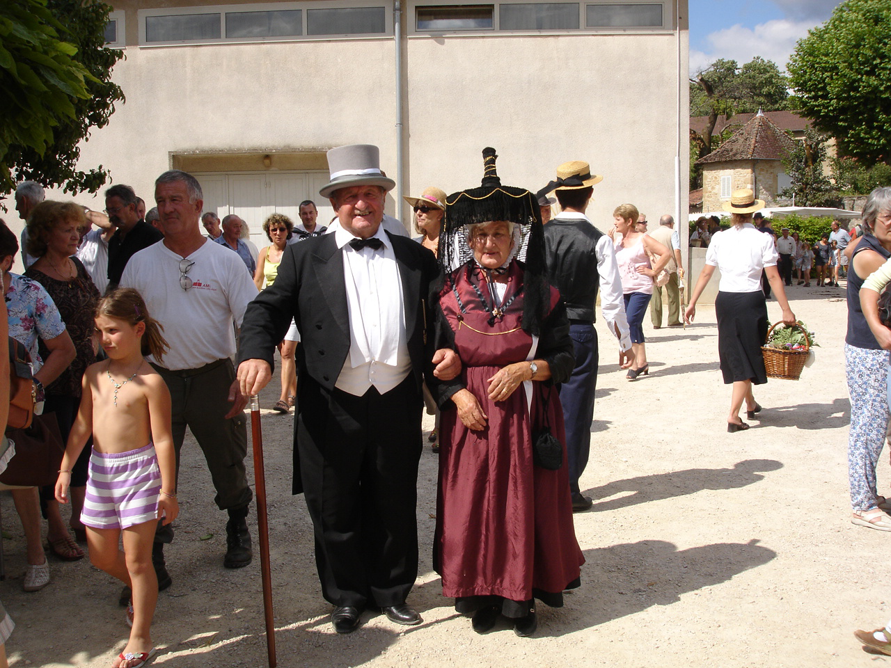 Coligny : Couple en costume traditionnel bressan